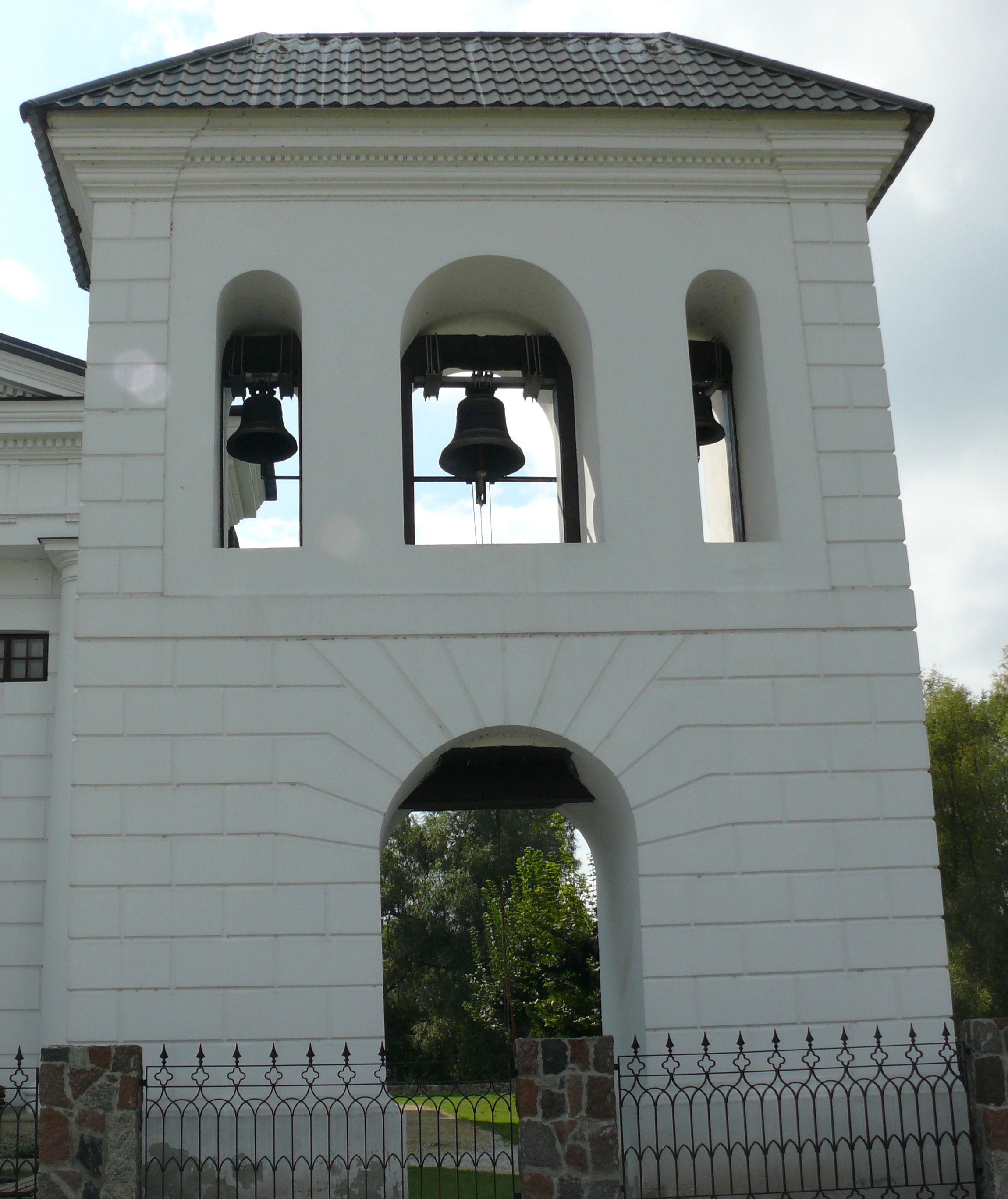 Cerkiew prawosławna pod wezwaniem św. Jana Teologa (dzwonnica) (XVIIIw.) - Terespol ul. Cerkiewna 2, powiat bialski, woj. lubelskie, (Zabytek nr. A/77 z 4.04.1958 i z 25.11.1966)